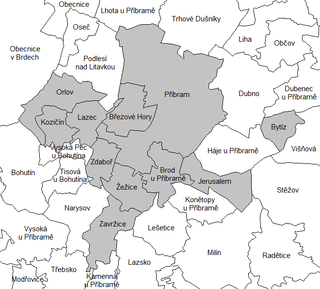 Katastrální mapa Příbrami a okolí